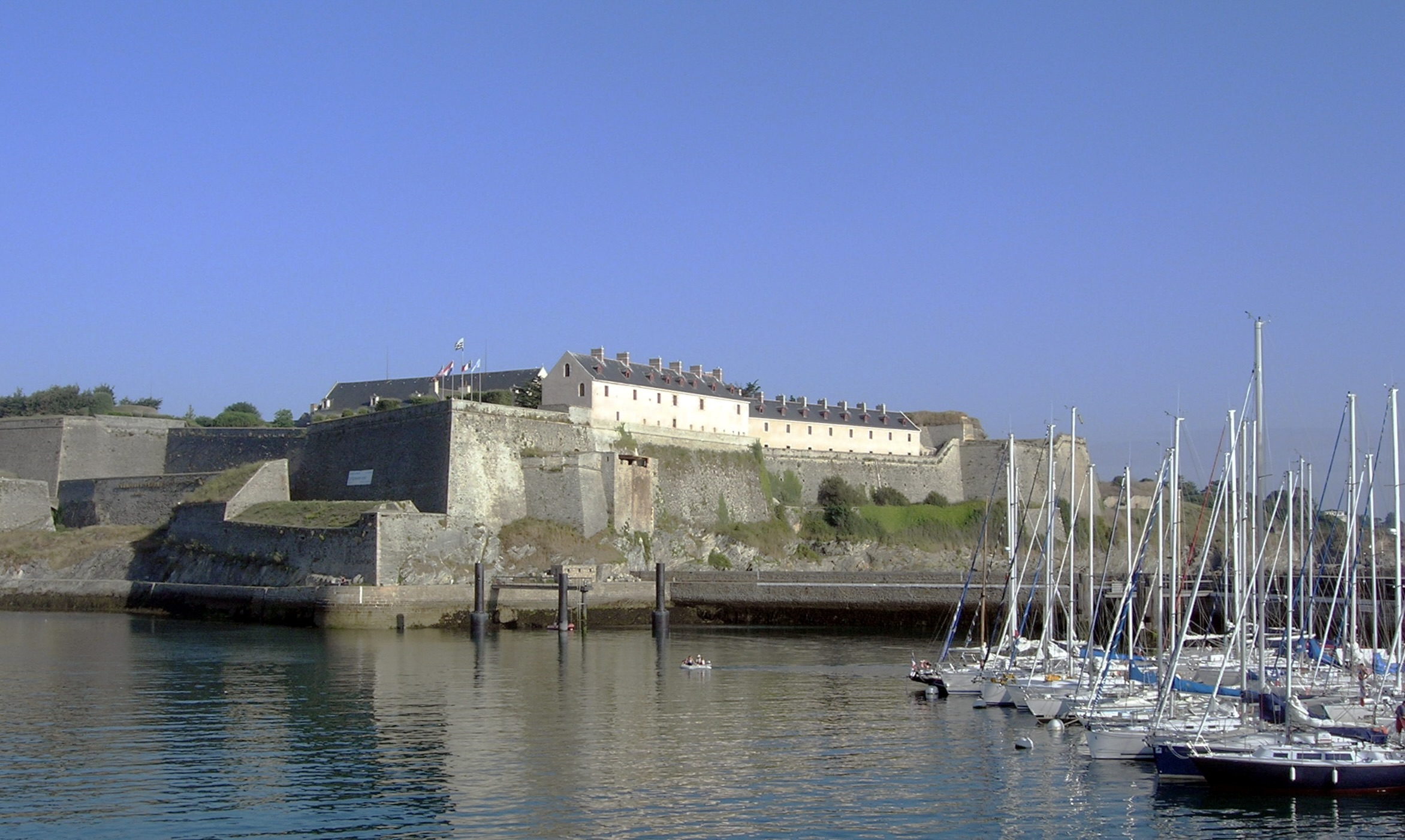 Description =La citadelle Vauban et le port du Palais a Belle Ile en Mer Source =Photo taken by Remi Jouan Date =Aout 2006 Author =Remi Jouan